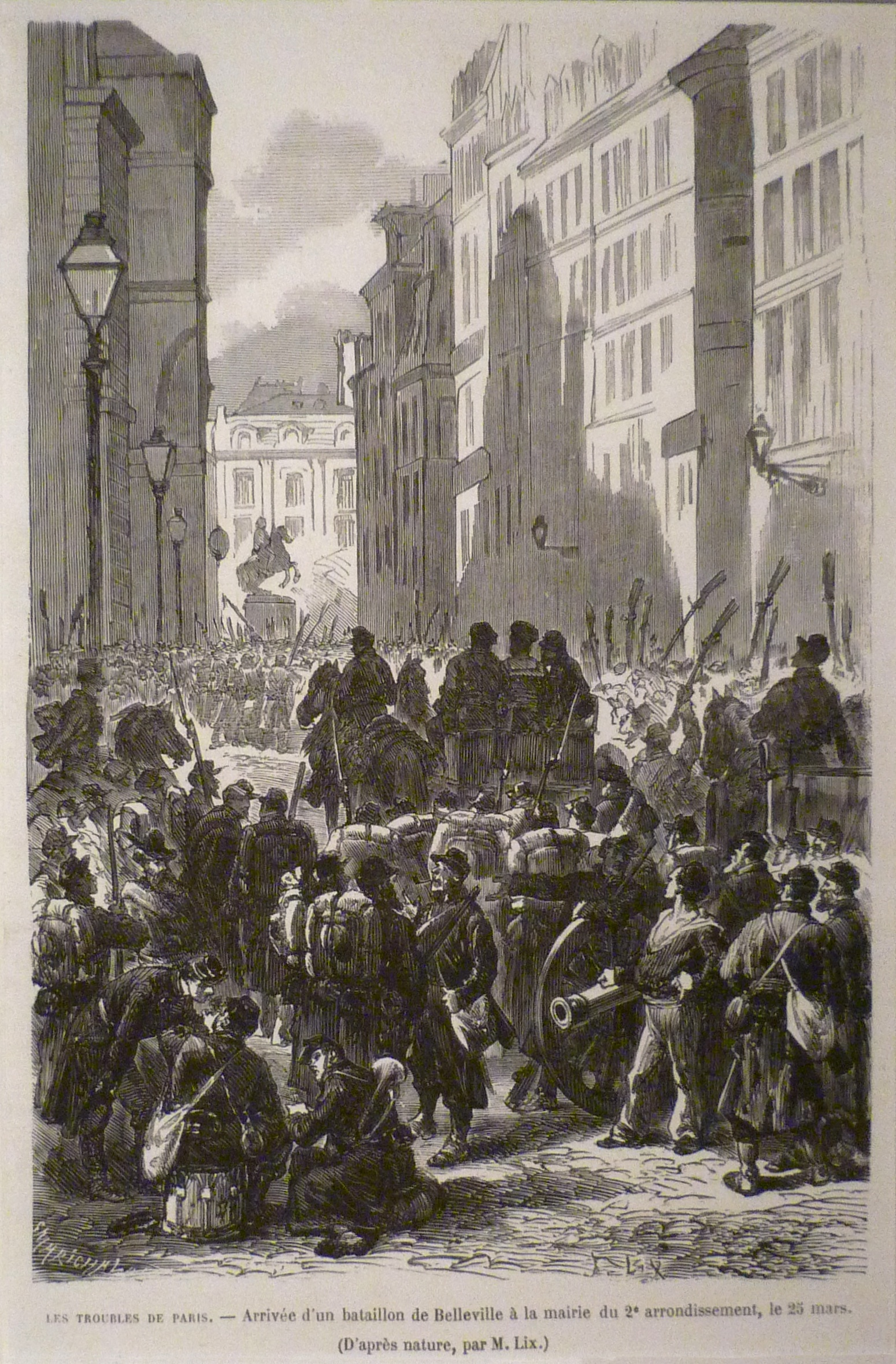 Exposition La Commune de Paris à l'Hôtel de Ville de Paris (18 mars - 28 mai 2011) - 25 mars 1871, arrivée d'un bataillon de gardes nationaux de Belleville devant la mairie du 2e arrondissement - Gravure de Frédéric Lix pour Le Monde illusté du 1er avril 1871.